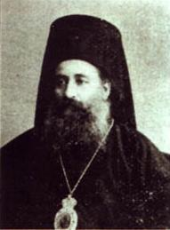 Лукас Петридис